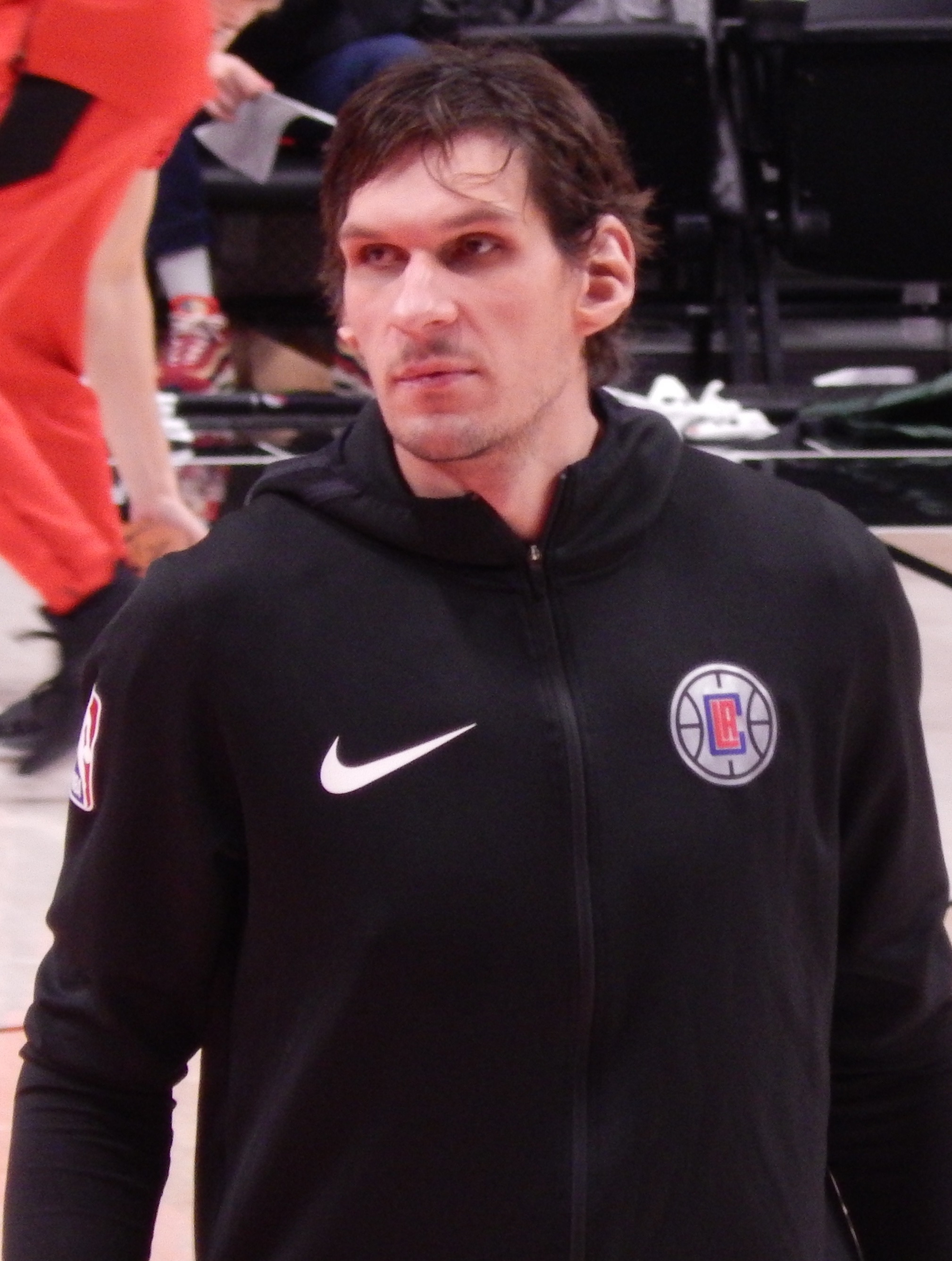 Boban Marjanovic #51 of the Los Angeles Clippers against the Portland Trail Blazers on November 8, 2018 at Moda Center in Portland, Oregon.